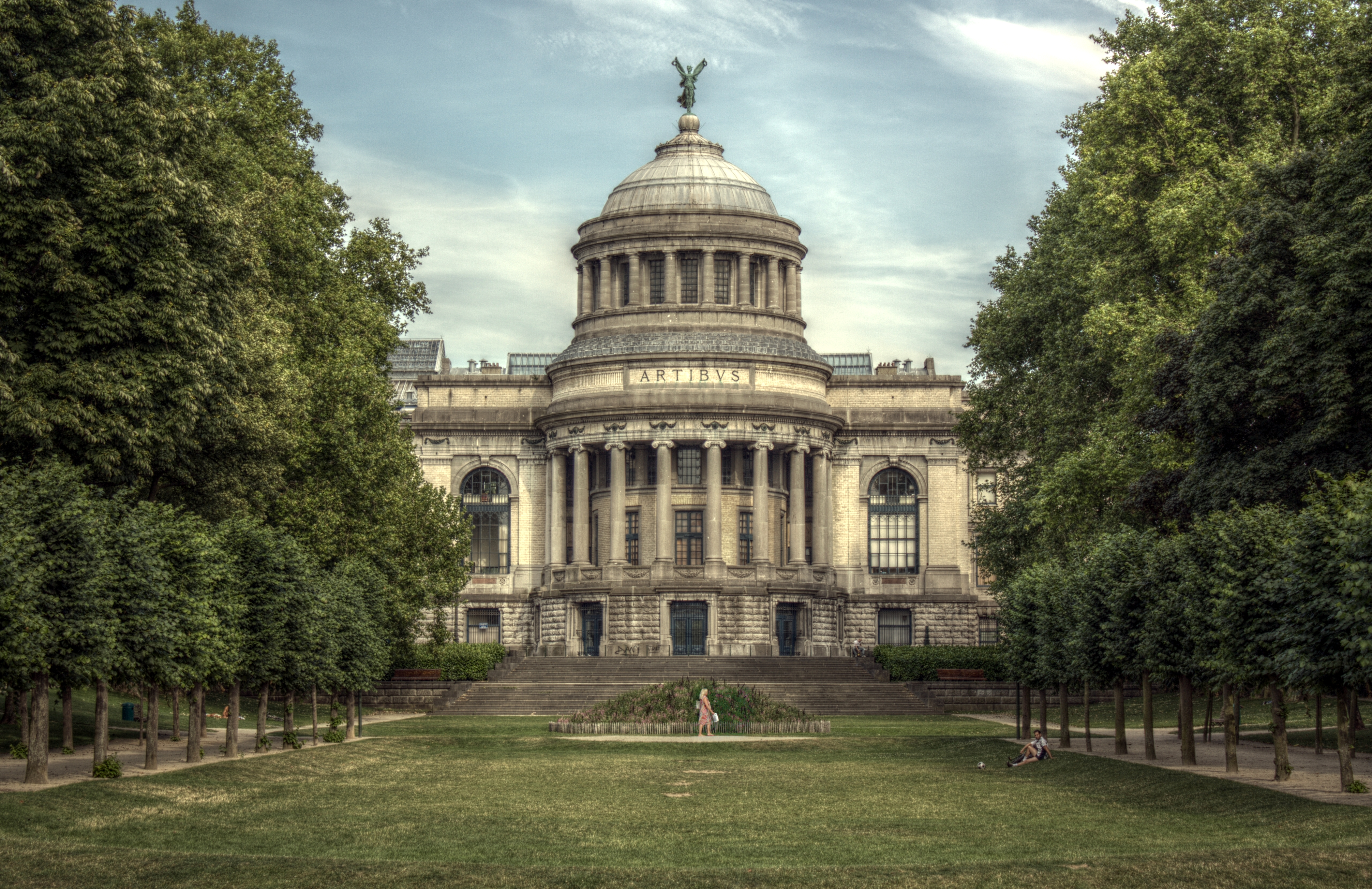 Museum royal d'Art et d'Histoire situé dans le parc du Cinquantenaire. Rendu HDR à l'aide du logiciel Qtpfsgui.